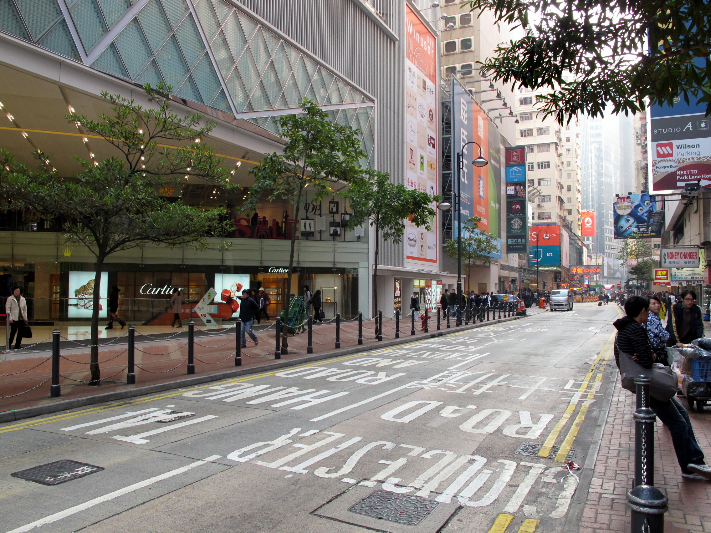 Great George Street, Hong Kong 記利佐治街